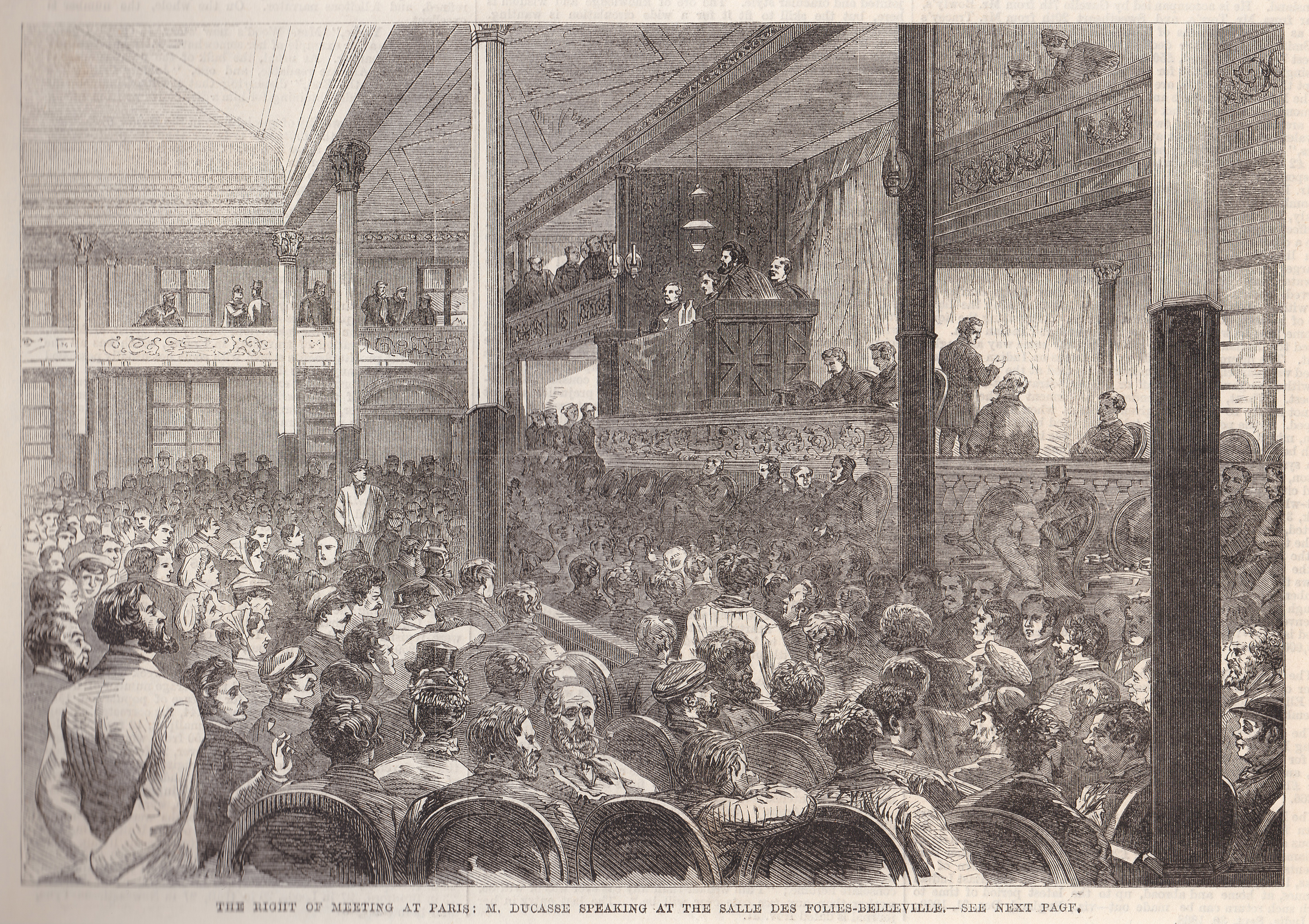 Félix Ducasse s'exprimant à la tribune d'une réunion publique salle des Folies-Belleville